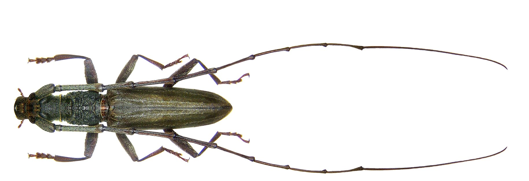 Familie: Cerambycidae Grösse: 22 mm Fundort: Malaysia, Borneo, Sabah leg. W.T.W.Meng, 2004; det. A.Weigel Foto: U.Schmidt, 2006